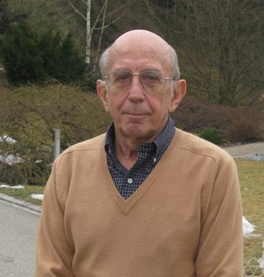 Foto di Alberto Isidori